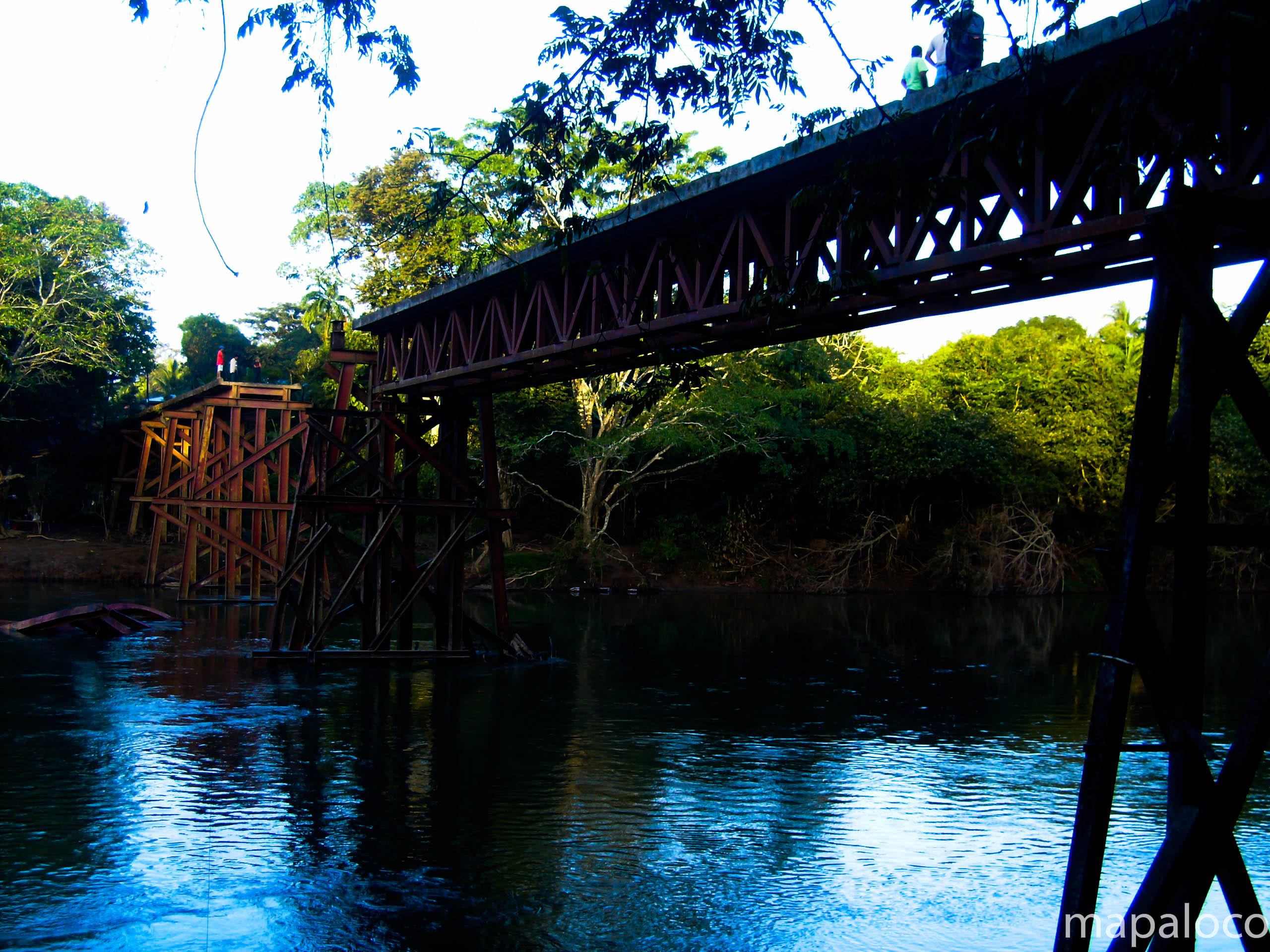 Puente Wany, vista desde el lado sur-este.